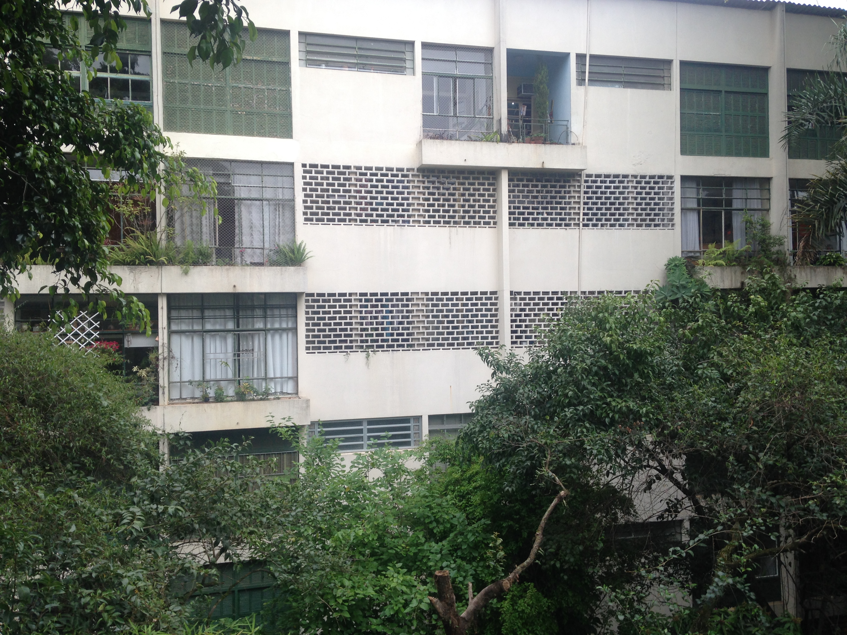 Lateral do edifício Guapira visto de dentro do conjunto aproximada com detalhes das janelas.